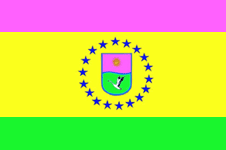 Прапор Тростянецького району Вінницької області